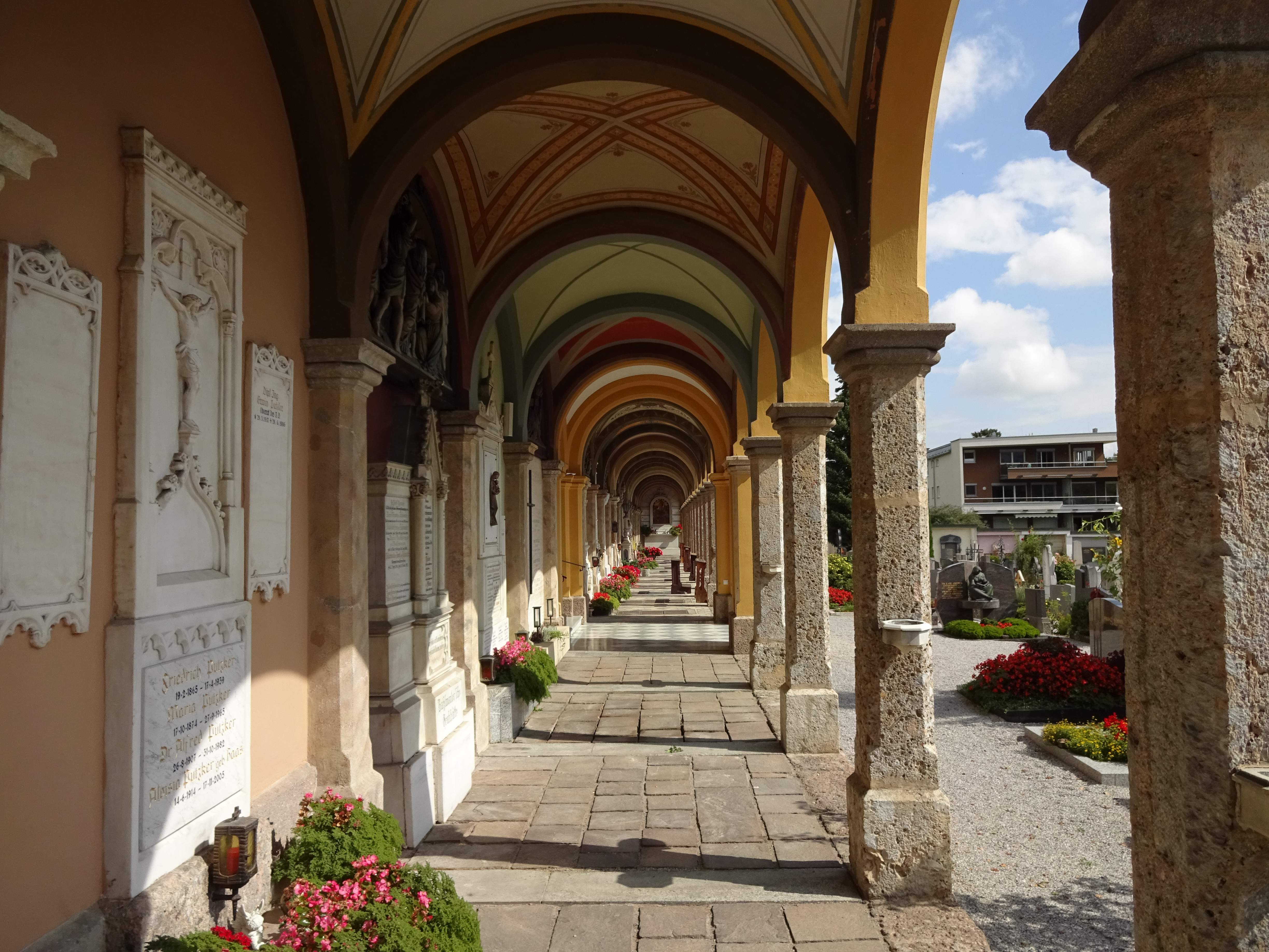 Tiroler Landesfriedhof Mariahilf, Arkaden, Blick Richtung Osten This media shows the remarkable cultural object in the Austrian state of Tyrol listed by the Tyrolean Art Cadastre with the ID 83557. (on tirisMaps, pdf, more images on Commons, Wikidata)